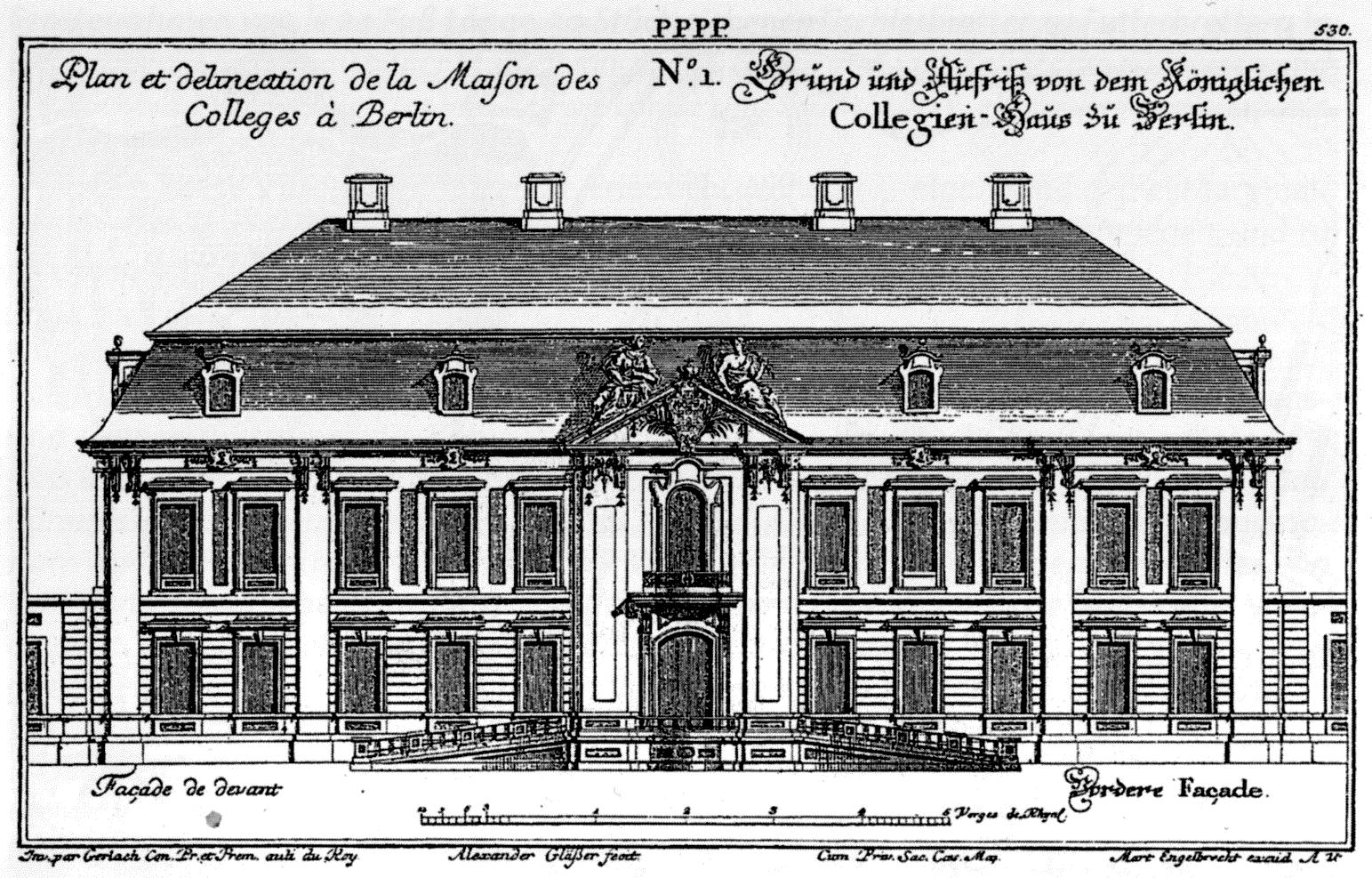 Kollegienhaus in Berlin. Plan et delineation de la Maison des Colleges à Berlin. Façade de devant. / Grund und Aufriß von dem Königlichen Collegien-Haus zu Berlin. Vordere Façade.